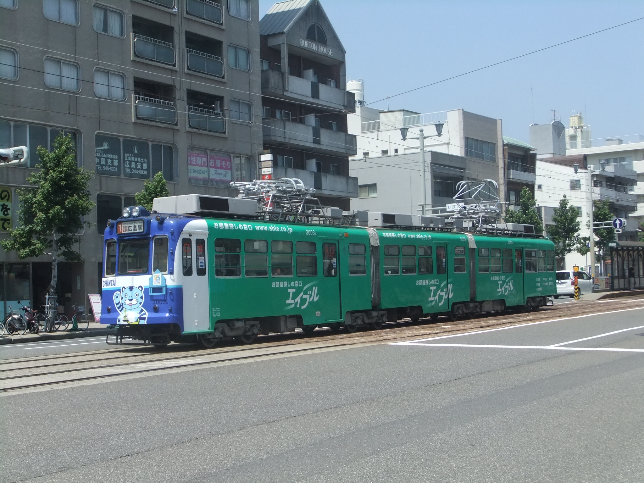 広島電鉄3003 ラッピング車両